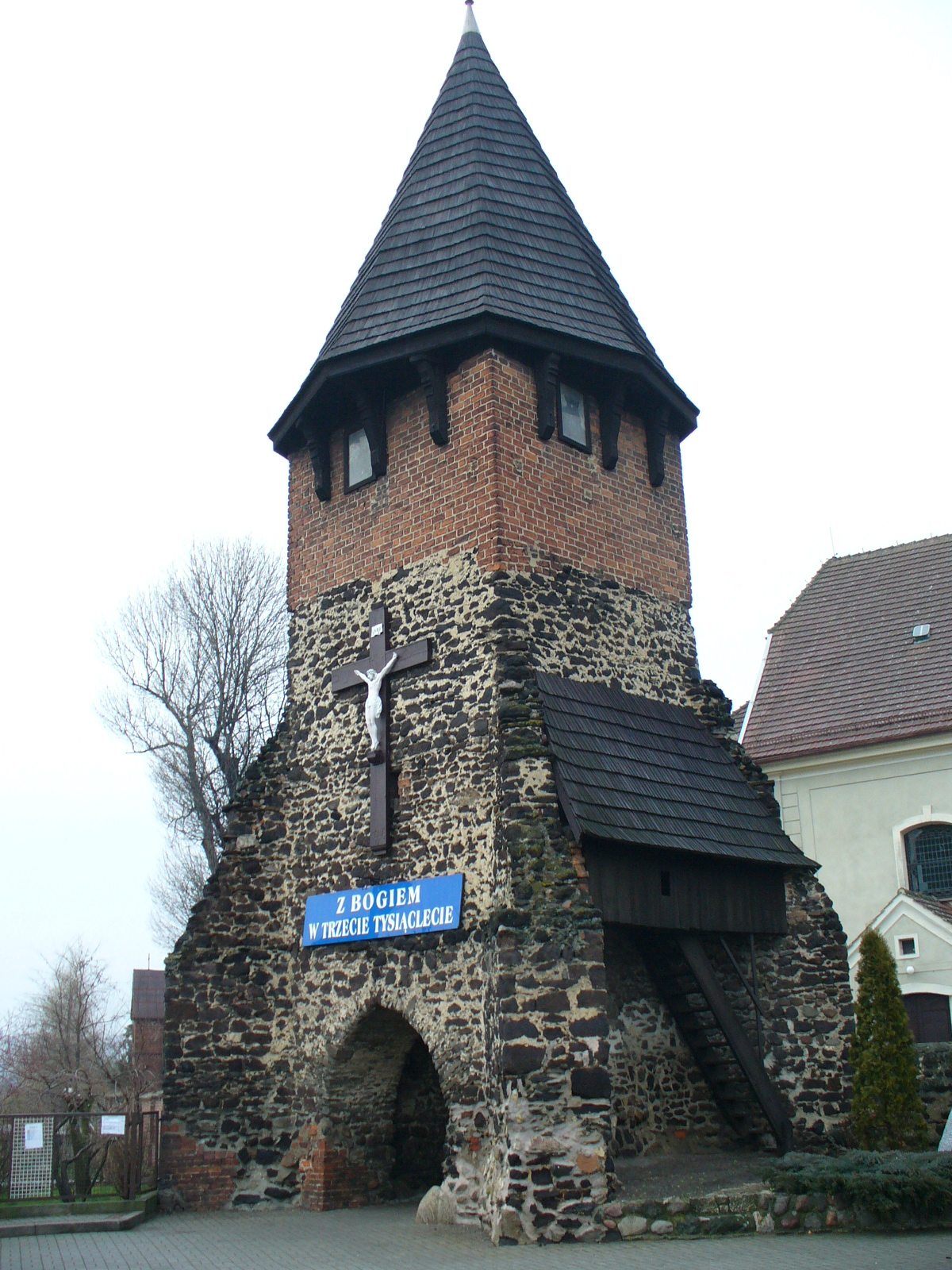 Chróścina - woj. opolskie. Dzwonnica kościelna